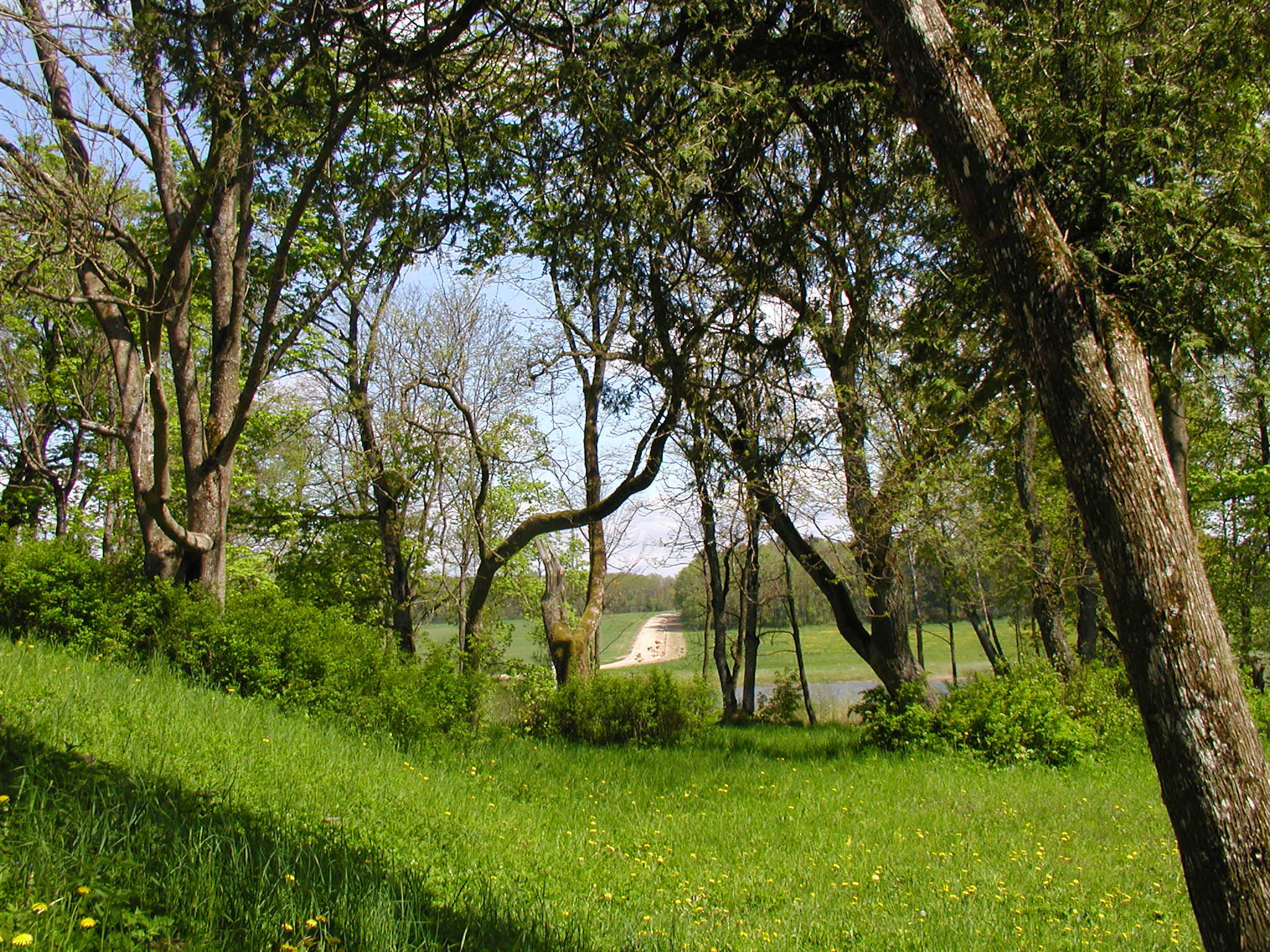 Беларуская (тарашкевіца): Фрагмэнты парку «Больцінікі». в. Больцінікі This is a photo of Belarusian heritage monument. Reference number: 412Г000126 ( WLM)